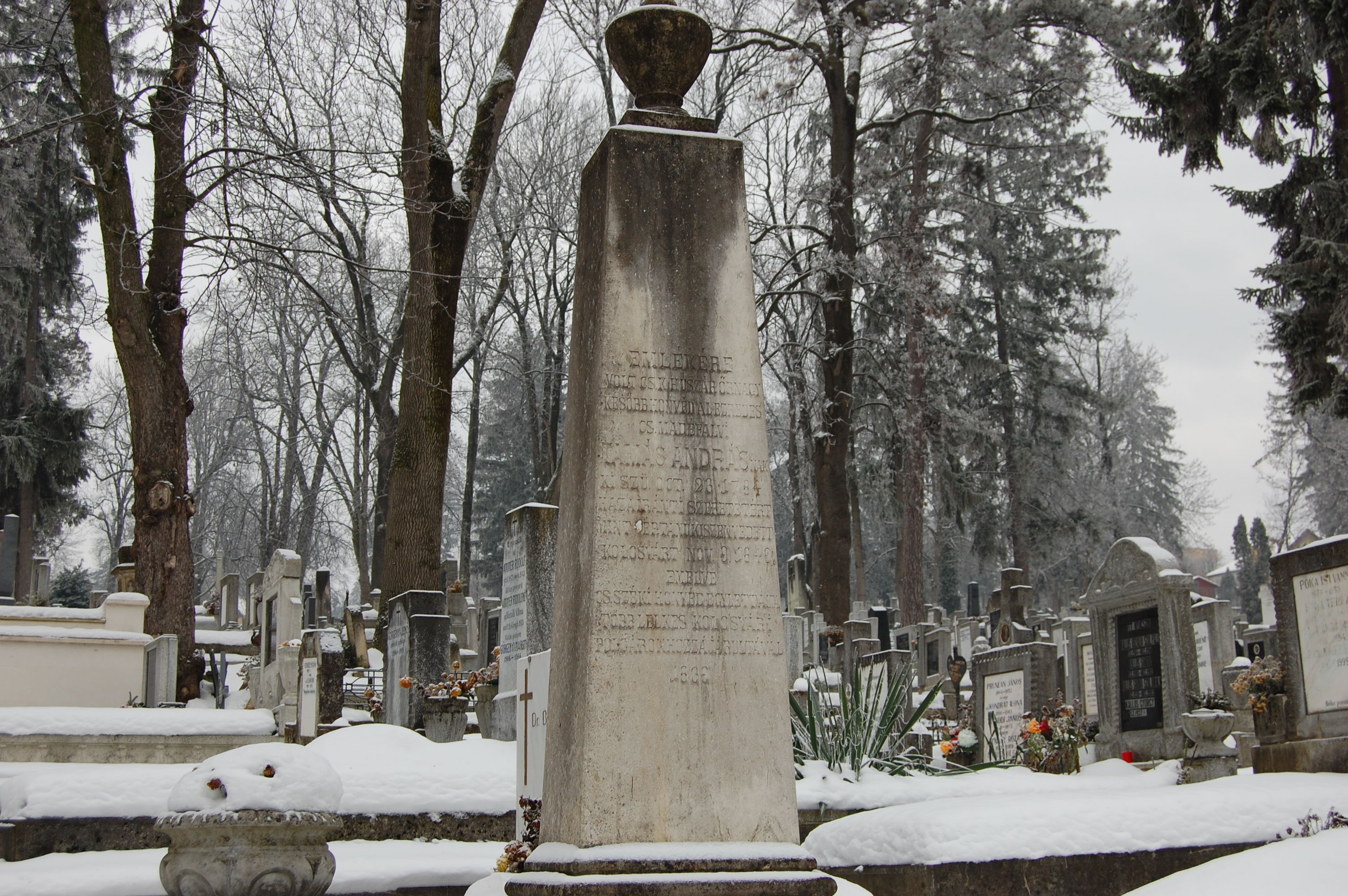 Tamás András 1848-as honvéd alezredes emlékműve a Házsongárdi temetőben, Kolozsvár 074